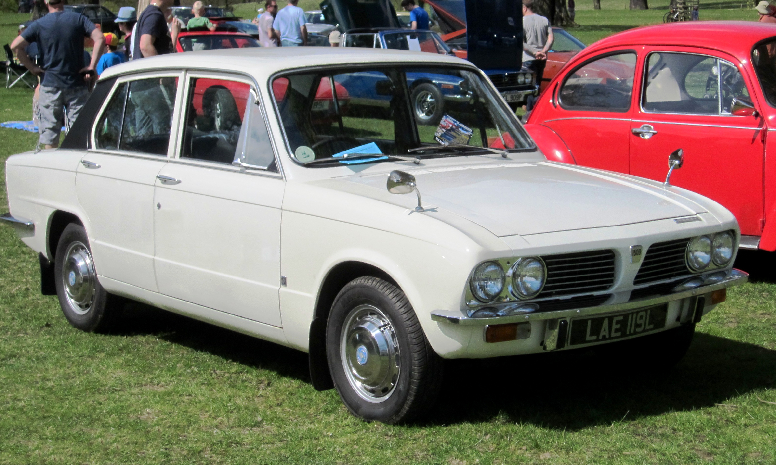 Triumph 1500 (traction)